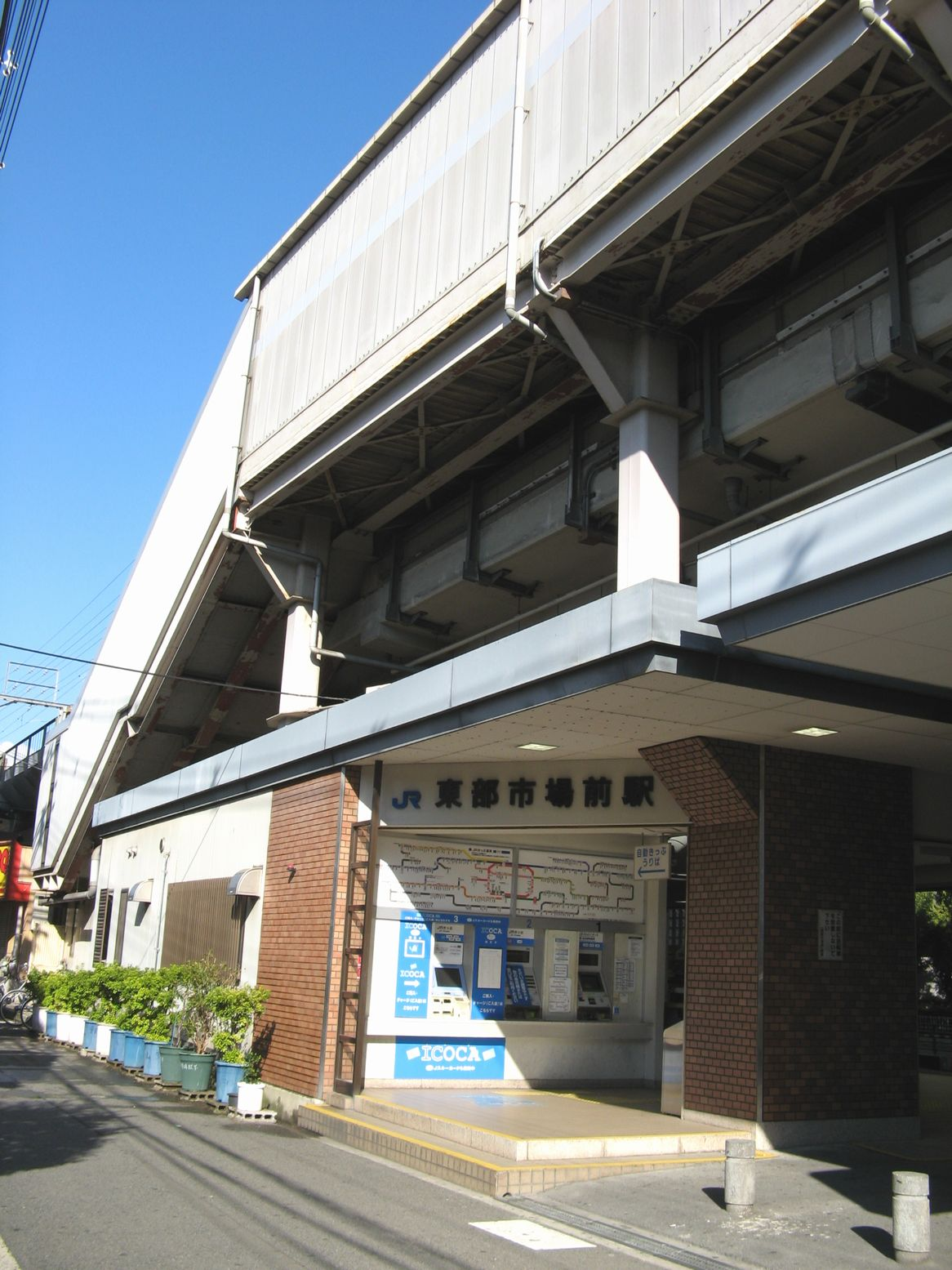 関西本線・東部市場前駅